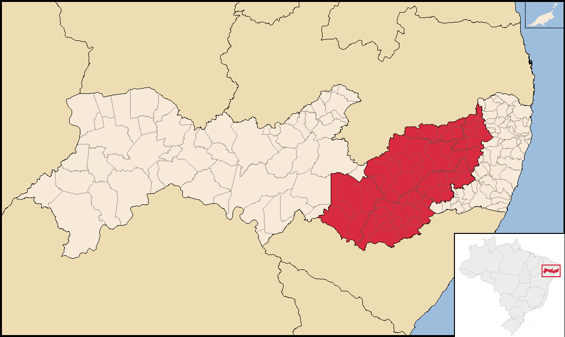 map